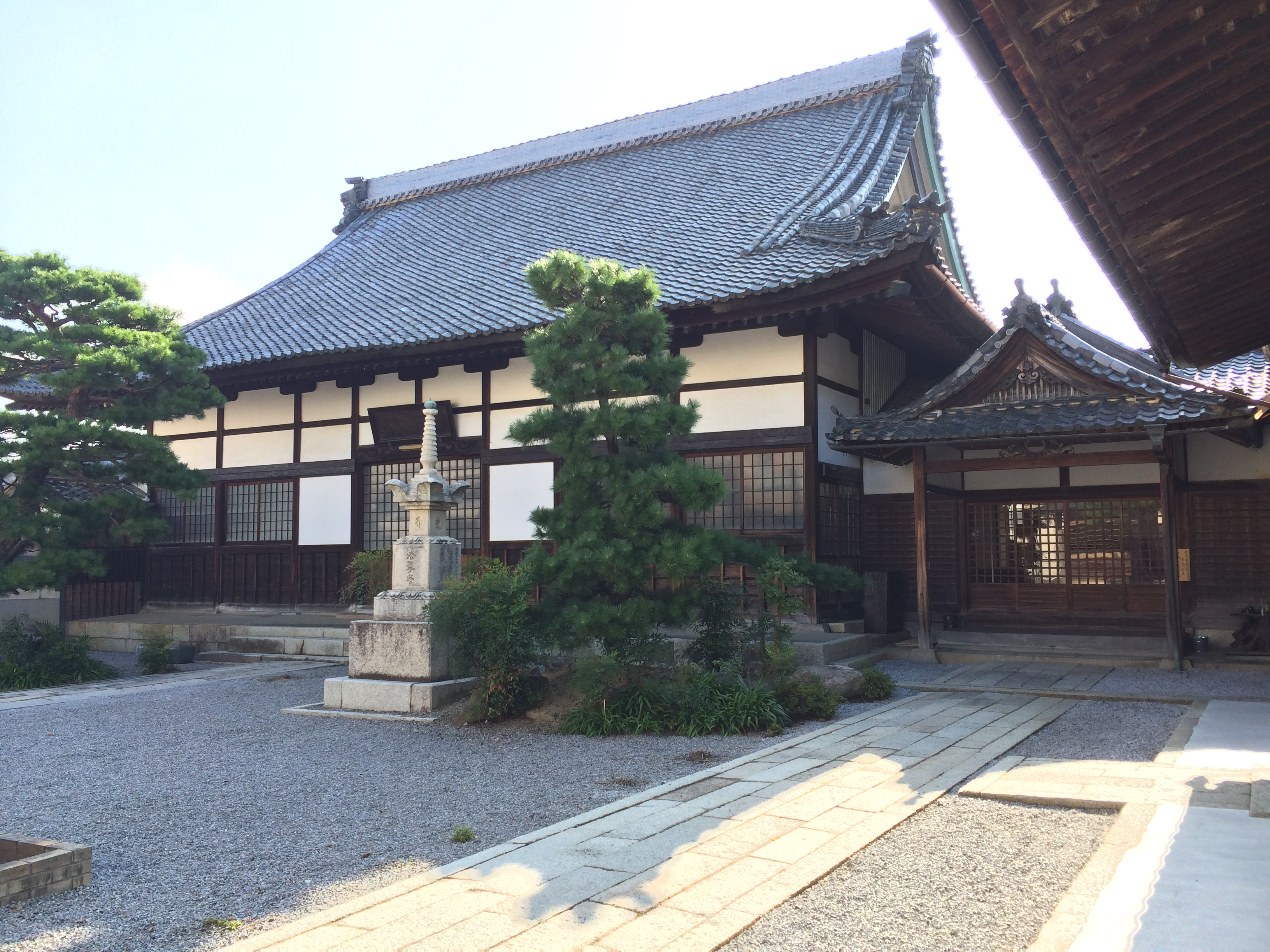 法堂の全体像